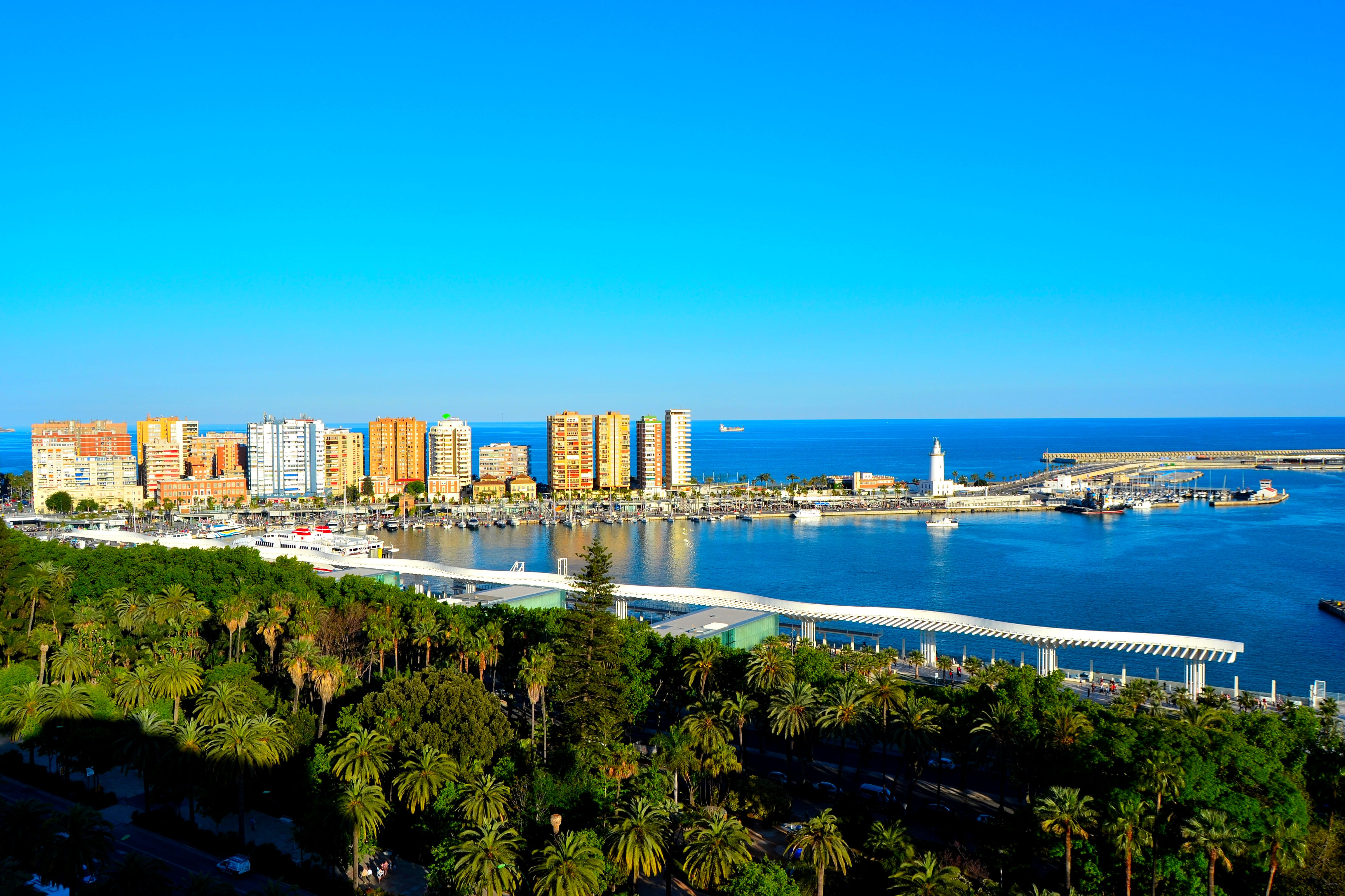 Puerto de Málaga